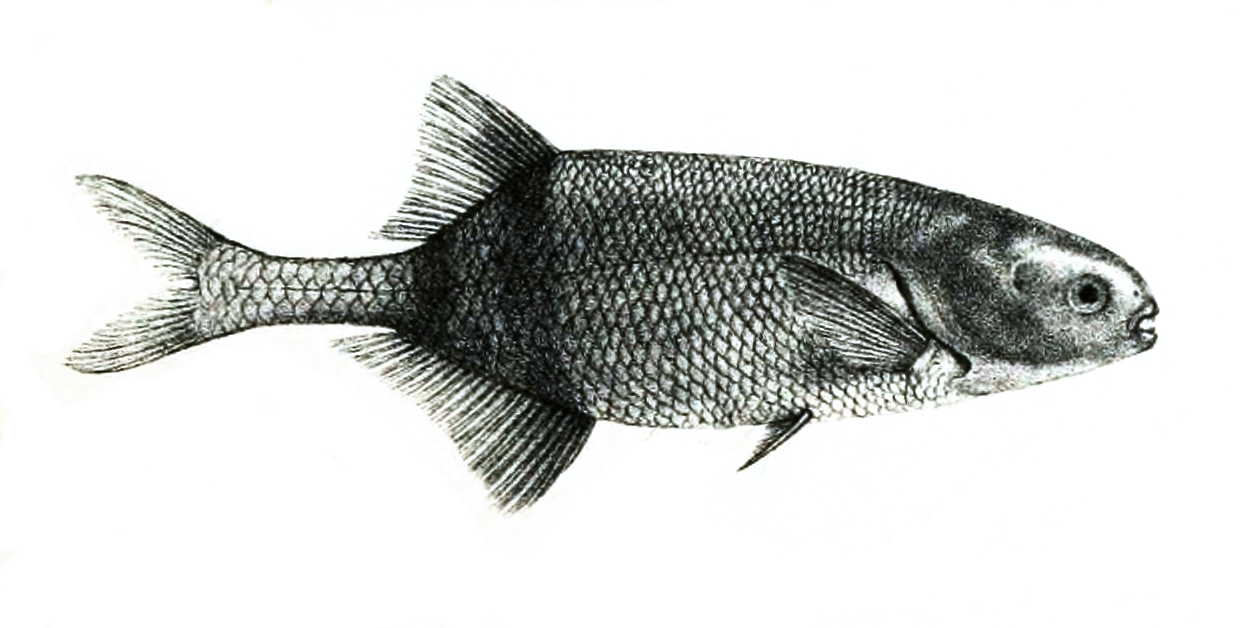 Mormyrus lepturus = Marcusenius moorii (Günther, 1867)